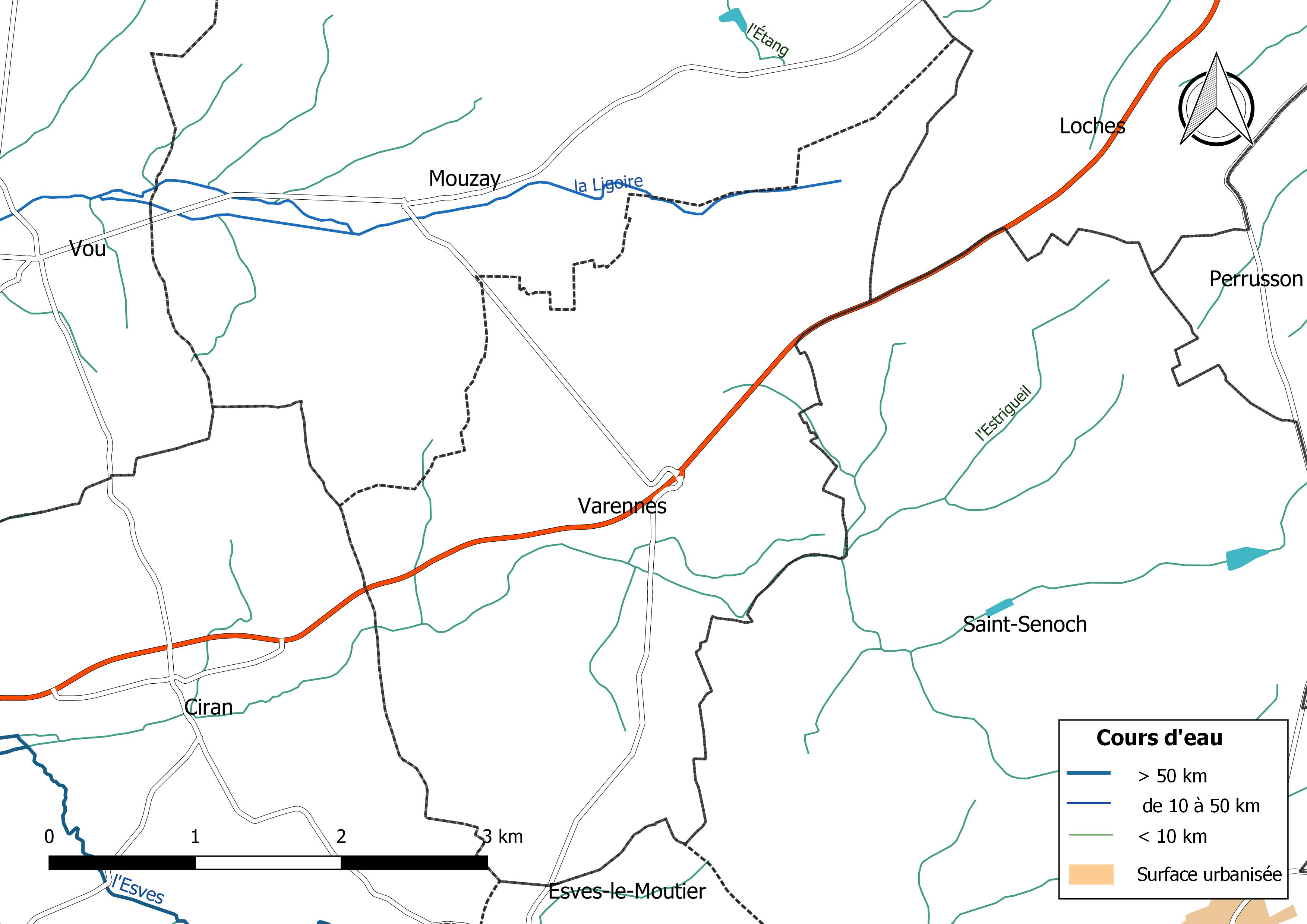 Carte du réseau hydrographique de la commune de Varennes (Indre-et-Loire) (France).